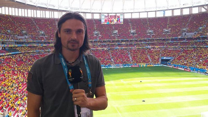 Lutz Pfannenstiel